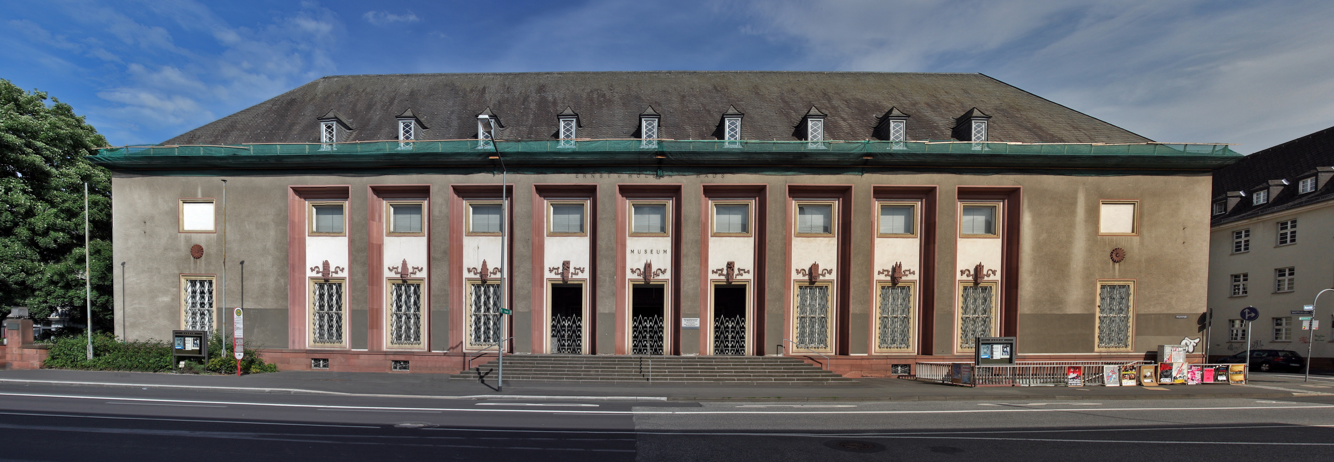 Das Marburger Universitätsmuseum für Bildende Kunst im Kunstgebäude